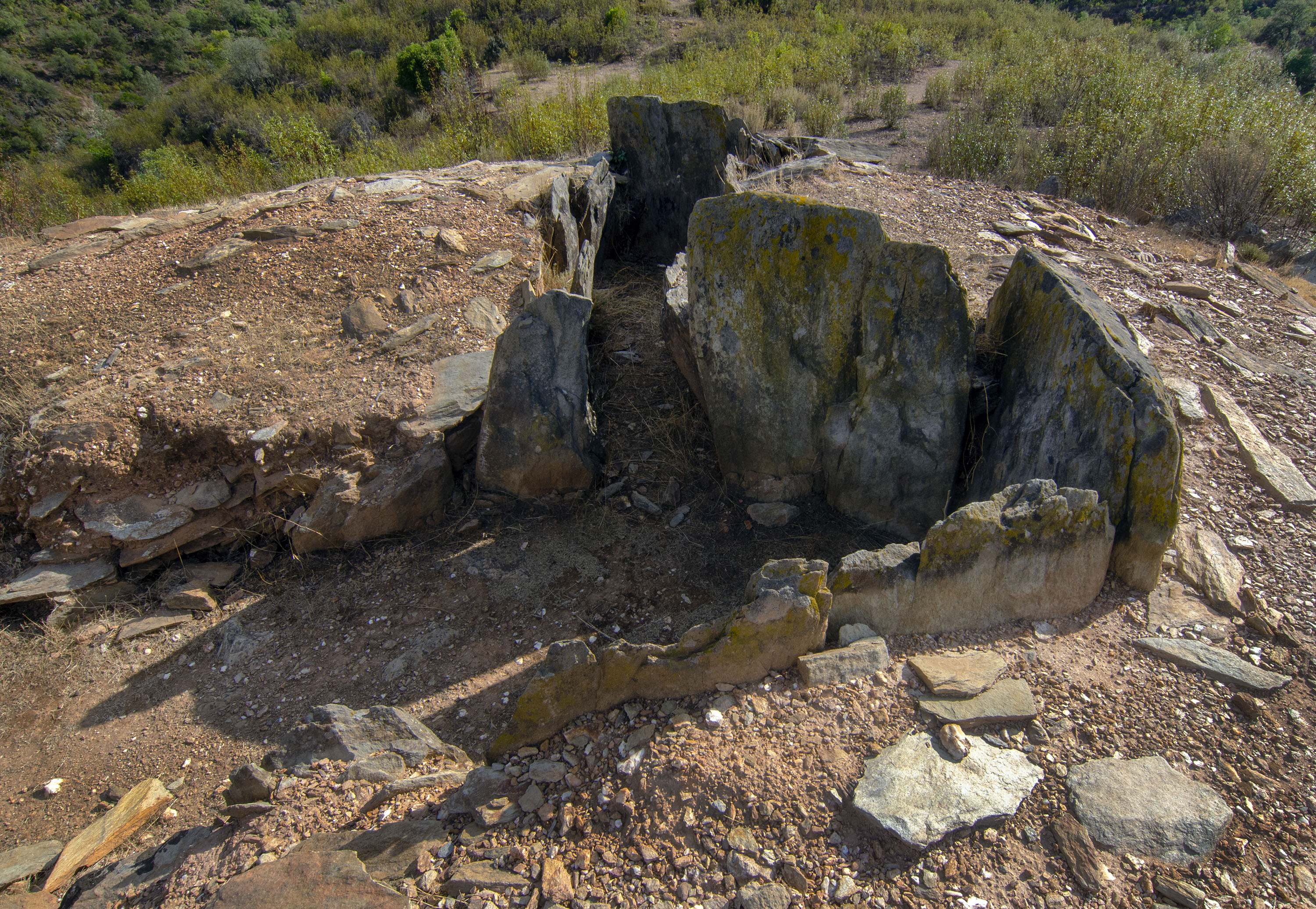 El Pozuelo, Zalamea la Real, Huelva.